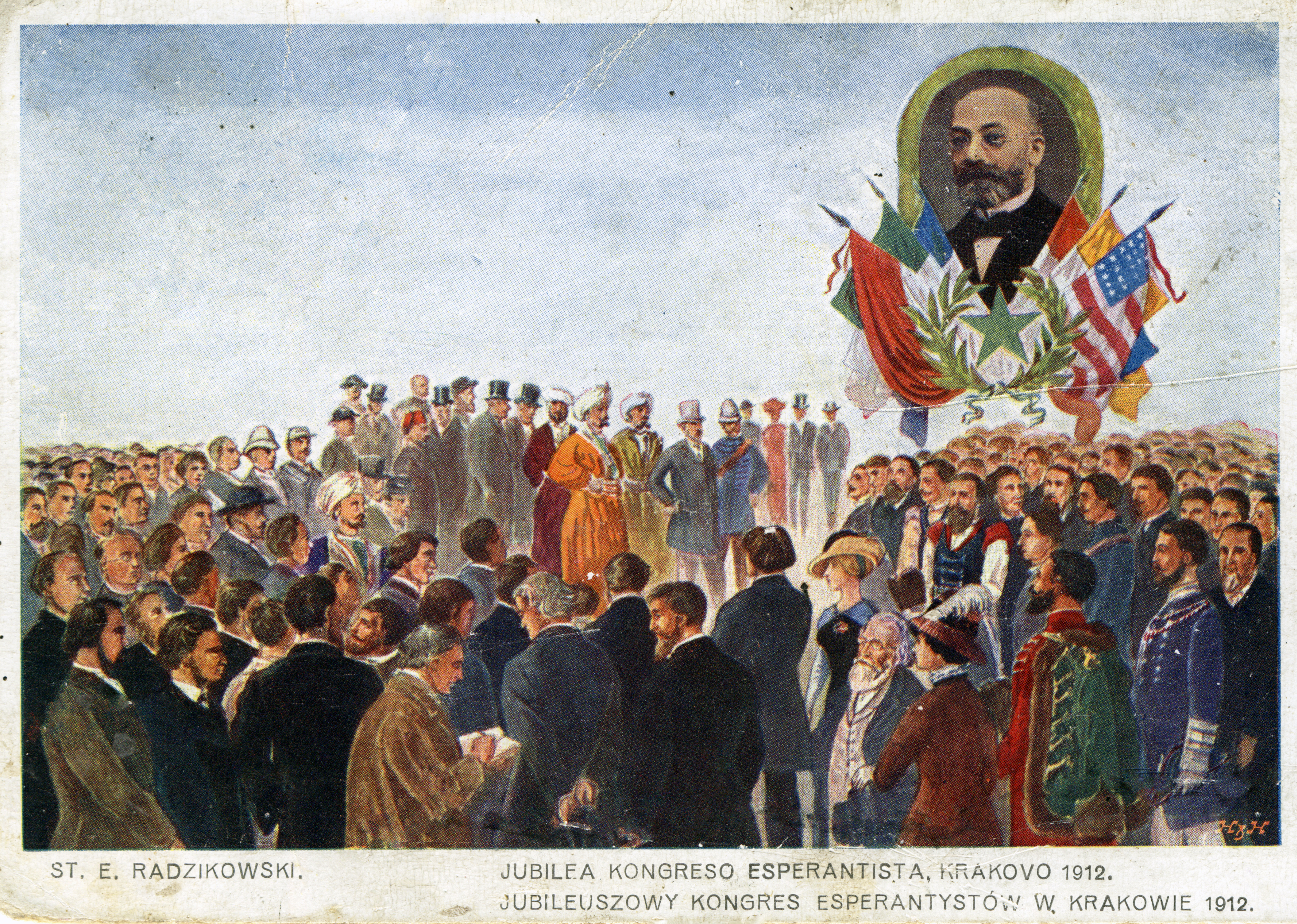 Poŝtkarto el UK 1912